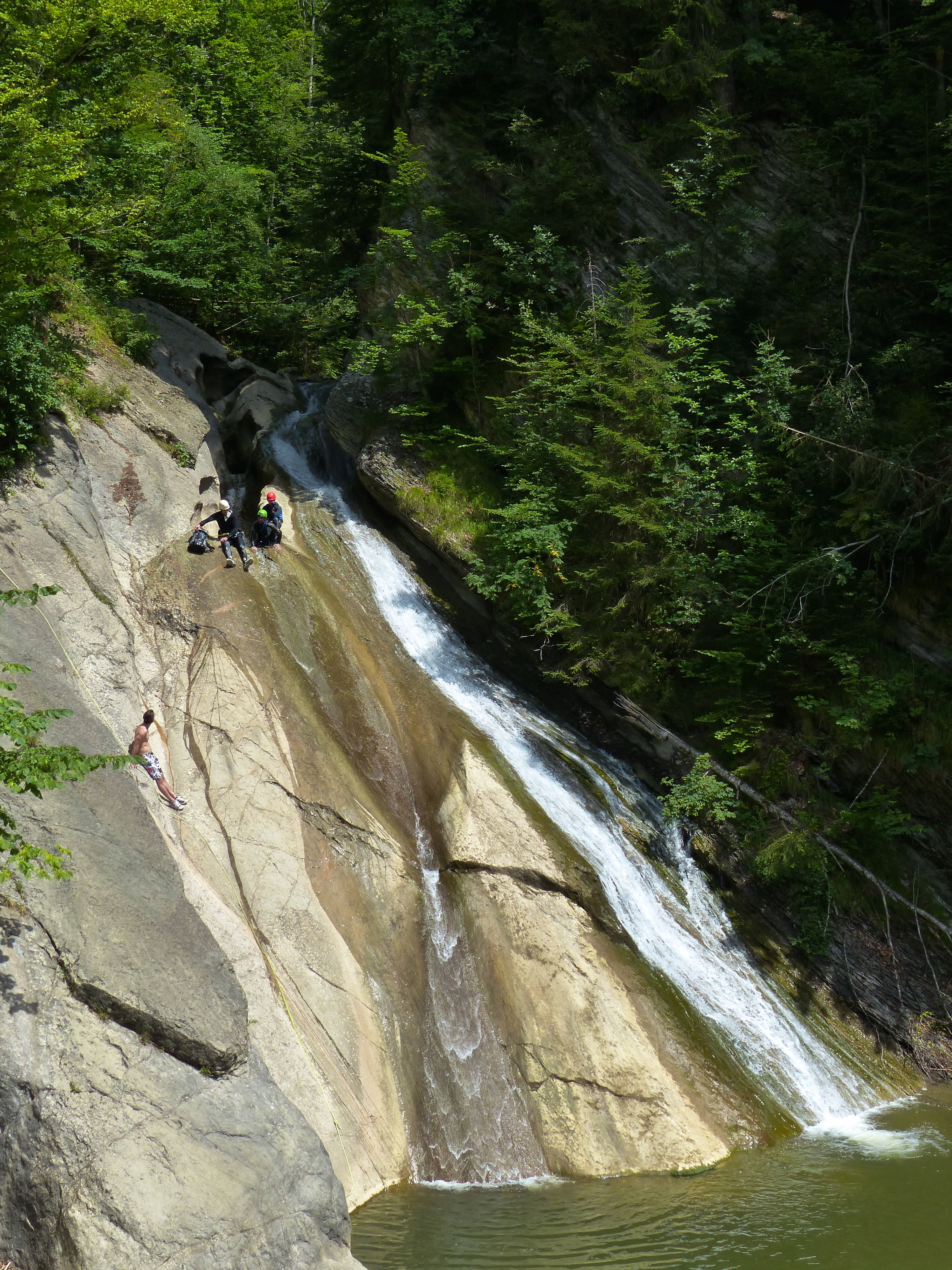 WikiProjekt Landstreicher Schleierfälle in Starzlachklamm